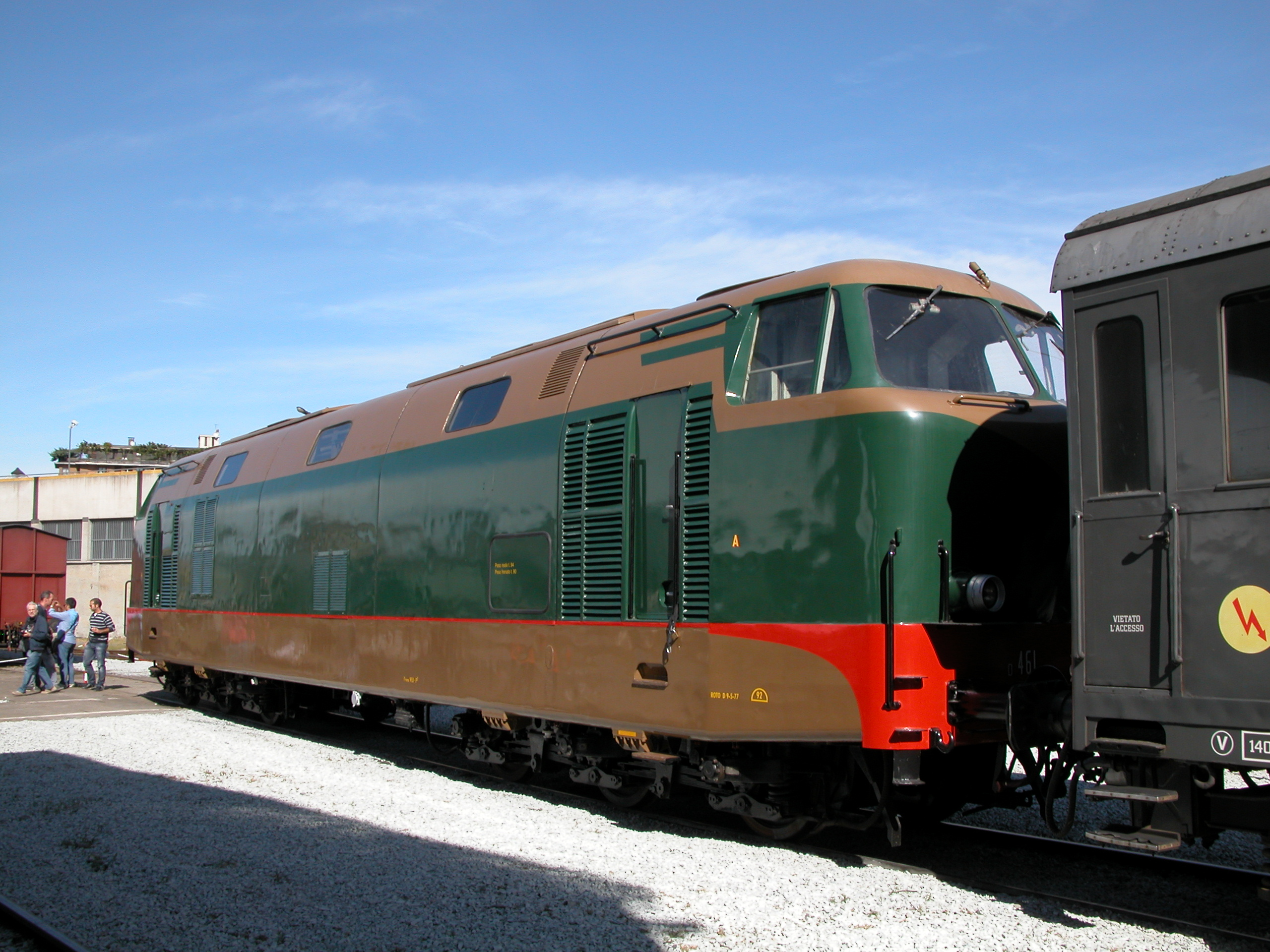 Vista di tre quarti laterale della locomotiva Diesel FS D.461.1001, restaurata per esposizione statica dal Museo Ferroviario Piemontese, dove ha sede abituale, ed esposta presso presso il Deposito Locomotive di Torino Smistamento in occasione della manifestazione pubblica per il centenario dell'impianto torinese (8-9 ottobre 2011).